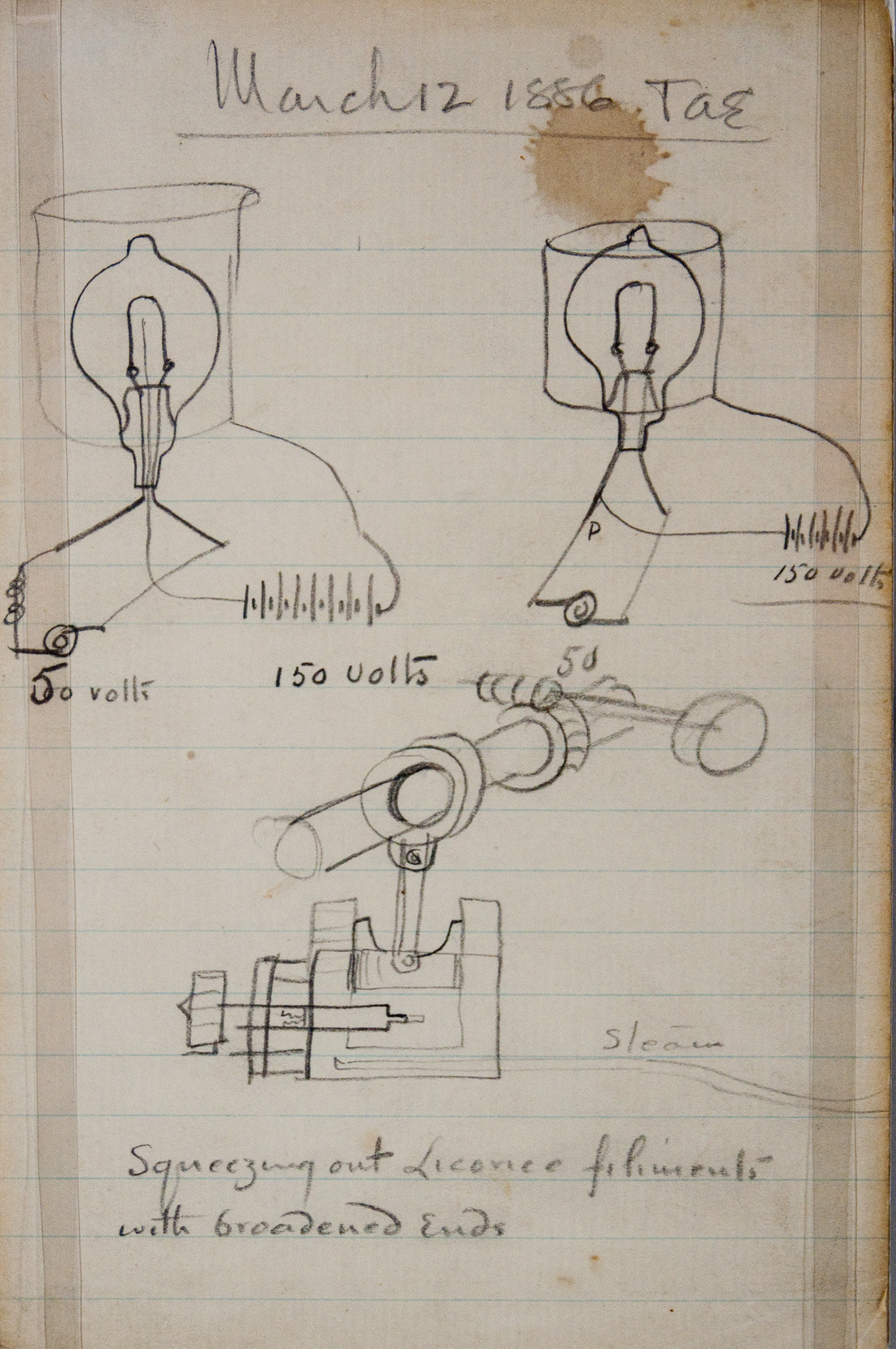 Dessin de Thomas Edison présentant une pômpe à vapeur et une ampoule, mars 1886, Musée des lettres et manuscrits, Paris.